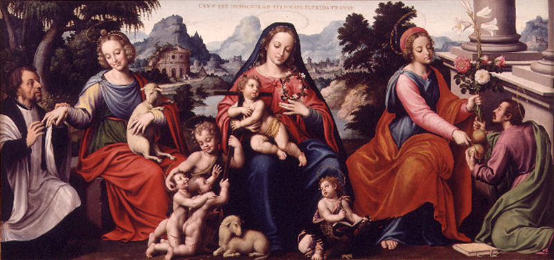 La obra representa las bodas místicas del venerable sacerdote Joan Baptista Anyés (1480-1553).